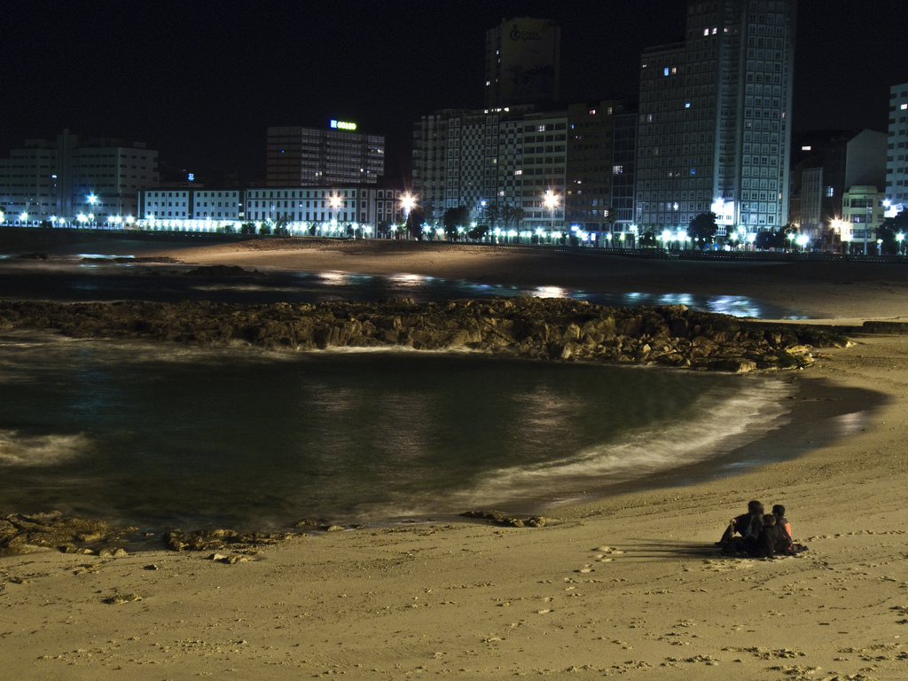 Meditación en Riazor, A Coruña, Galiza